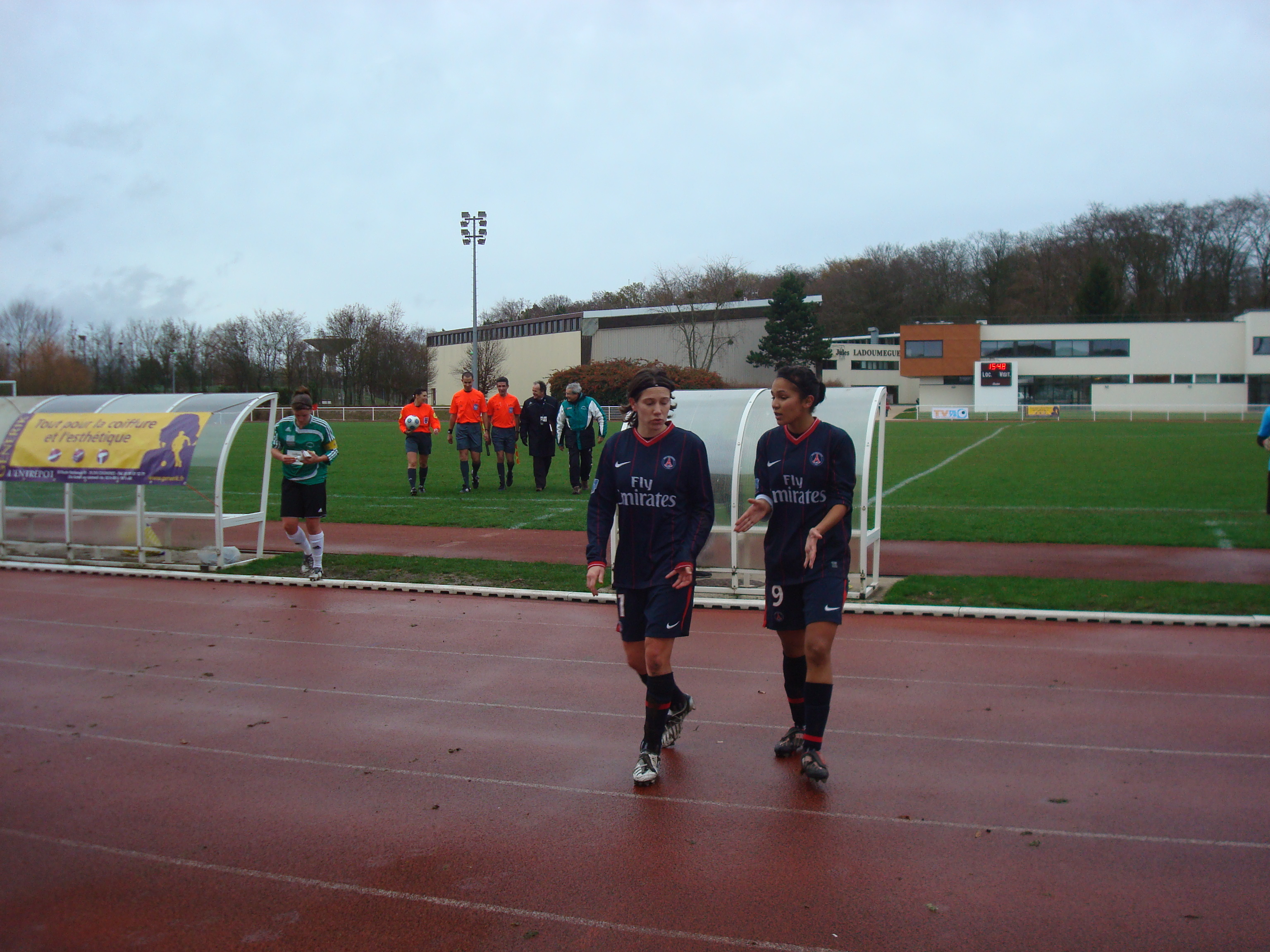 Elise Bussaglia et Zohra Ayachi lors du match ASMB-PSG, le 29 novembre 2009.